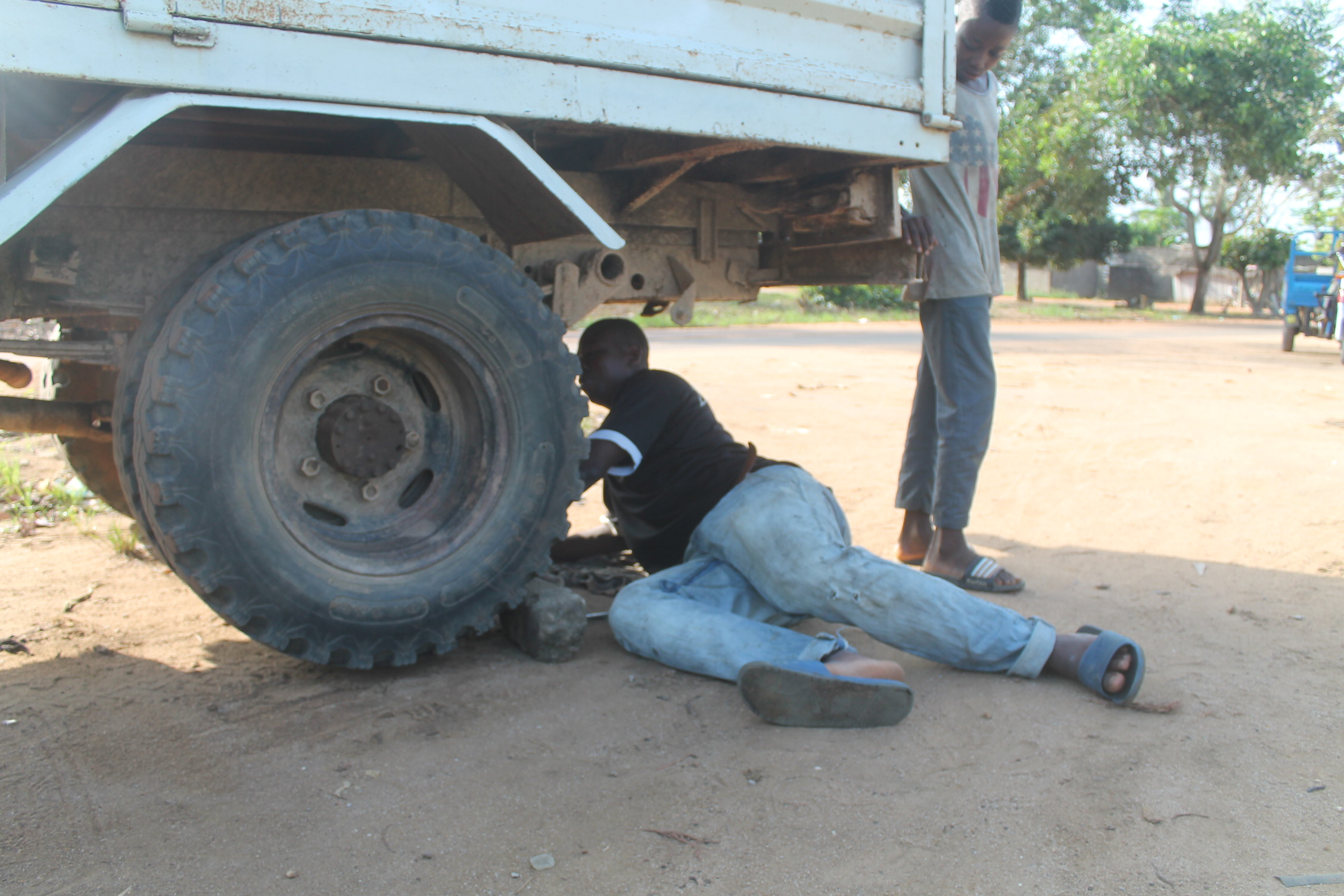 Un mécanicien en pleine journée de travail dans les rues d'Aboisso, une ville située au Sud de la Côte d'Ivoire. La ville est à environ 116 km d'Abidjan, la capitale économique ivoirienne. This is an image of "African people at work" from Ivory Coast